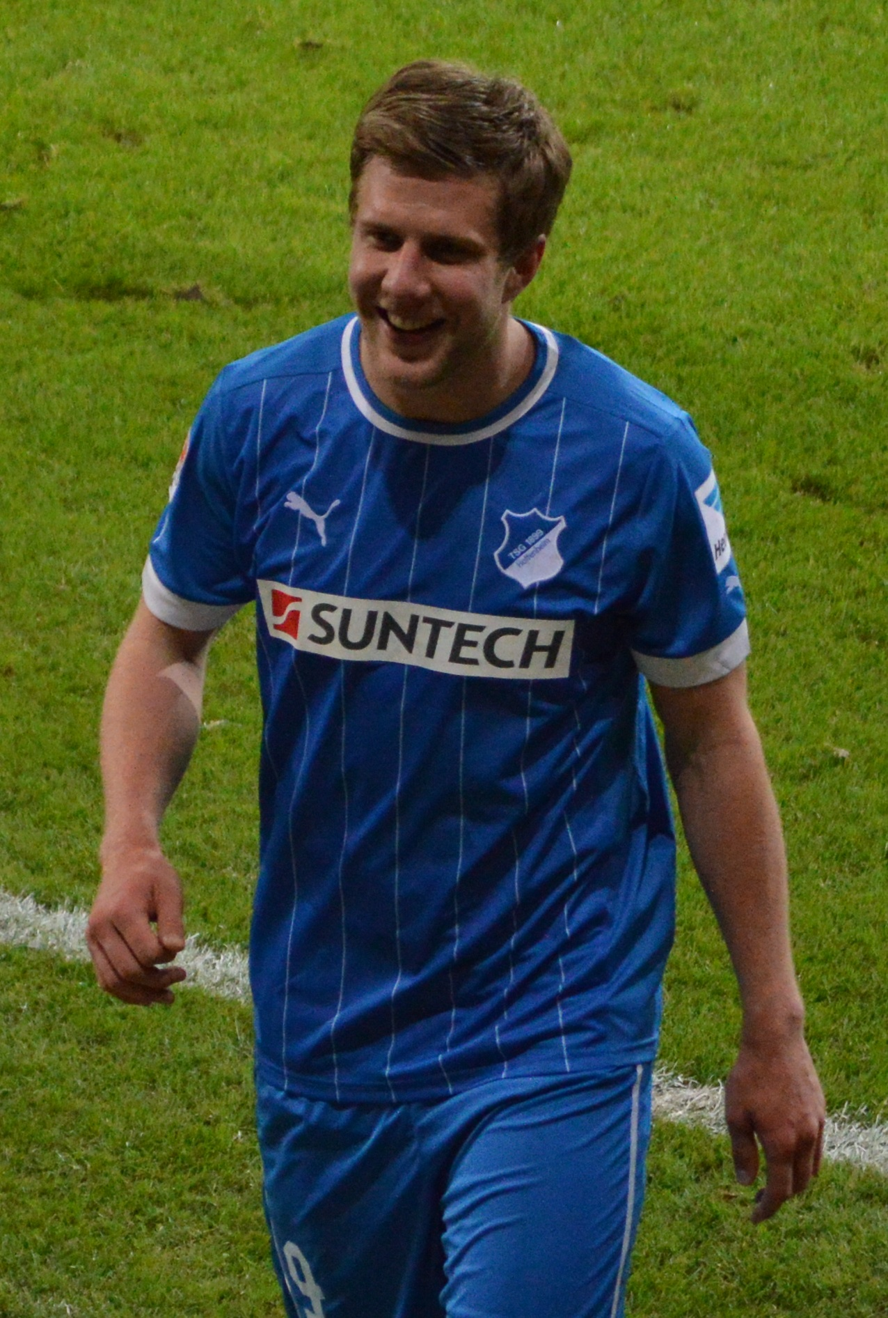 Sven Schipplock, 23. Mai 2013